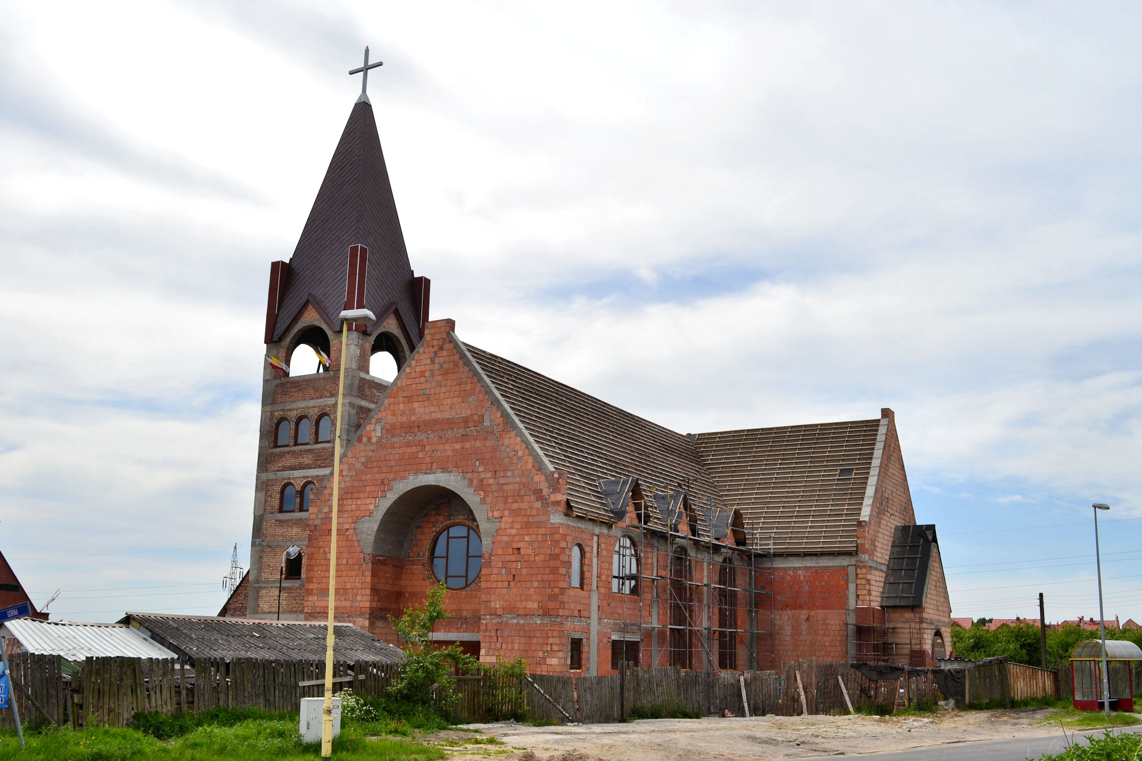 Szczecin Bukowo, ul. Ogrodnicza 72 - rzymskokatolicki kościół parafialny p.w. św. Siostry Faustyny Kowalskiej